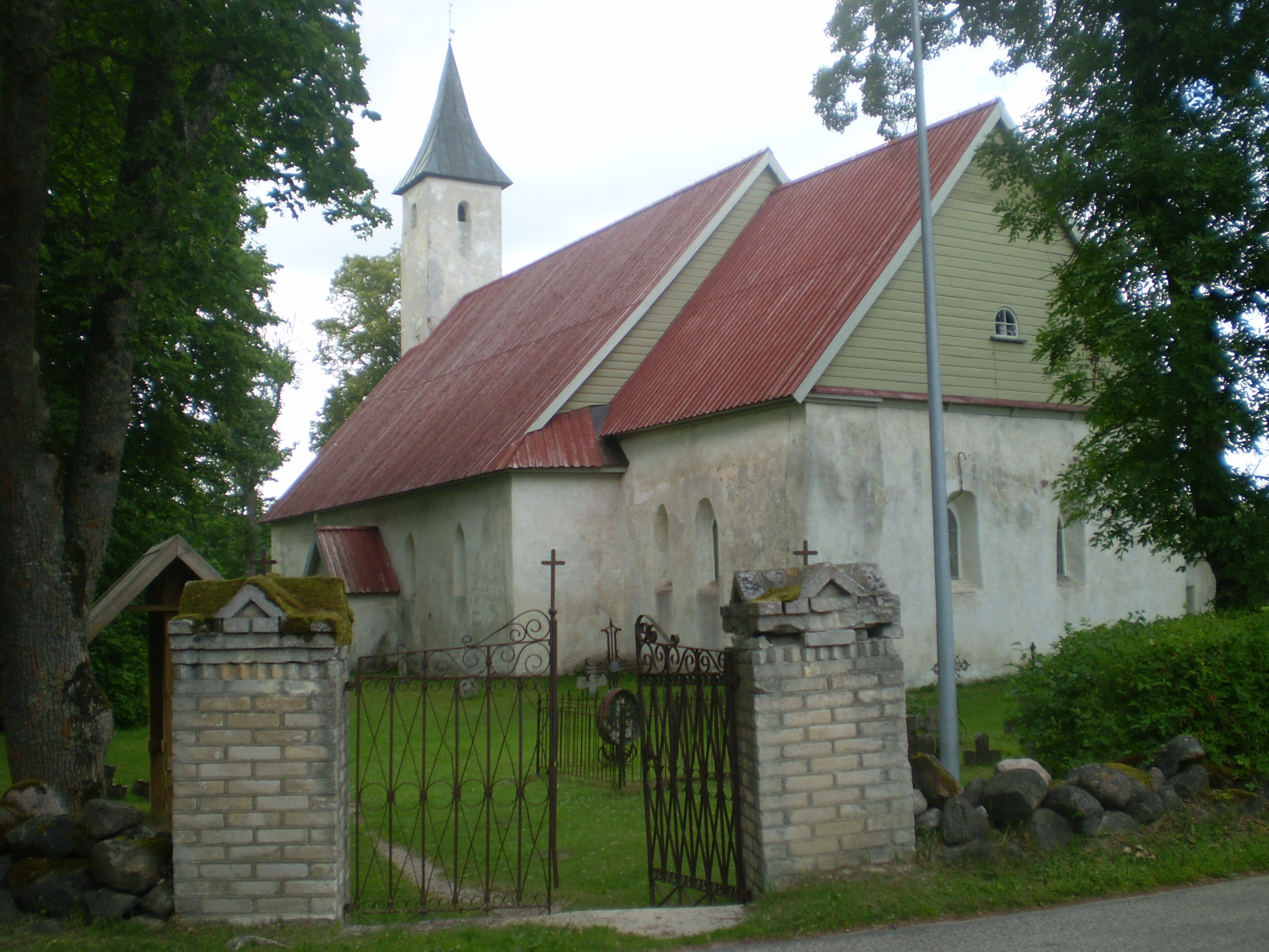 Noarootsi kirik